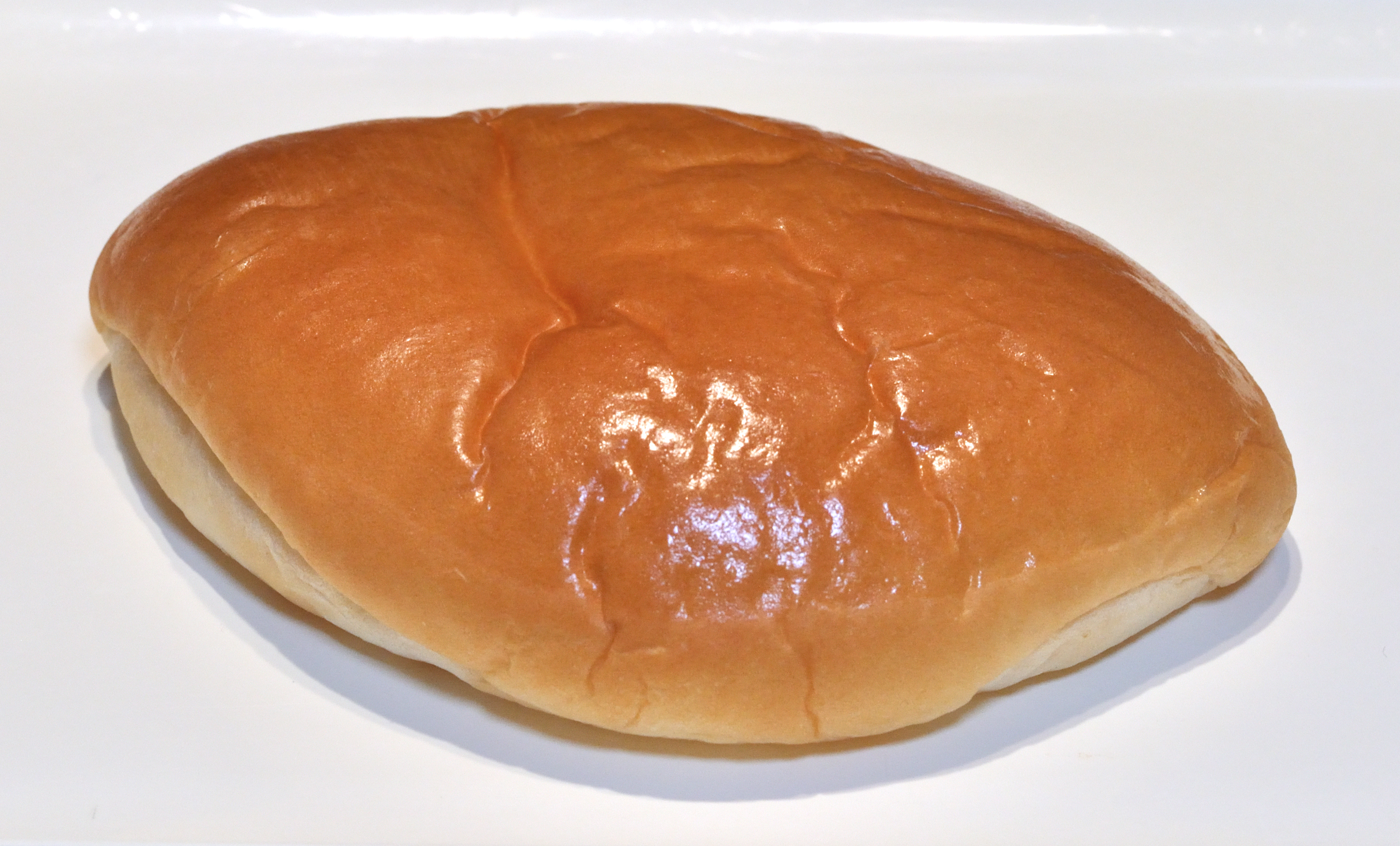 ヤマザキのジャムパン